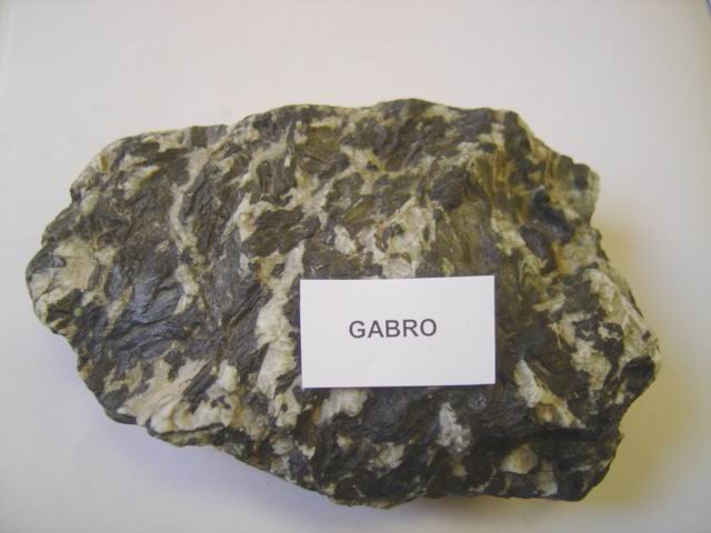 Gabbro rock